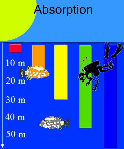 Absorption des Lichtes im Wasser